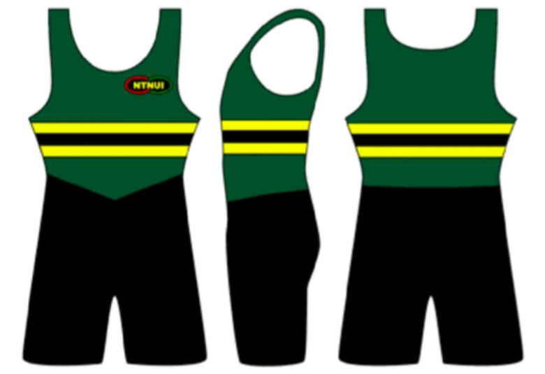 Rodrakt NTNUI Roing